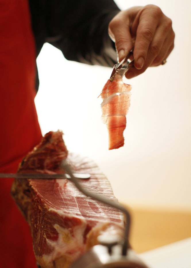 Cortando jamón en lonchas.